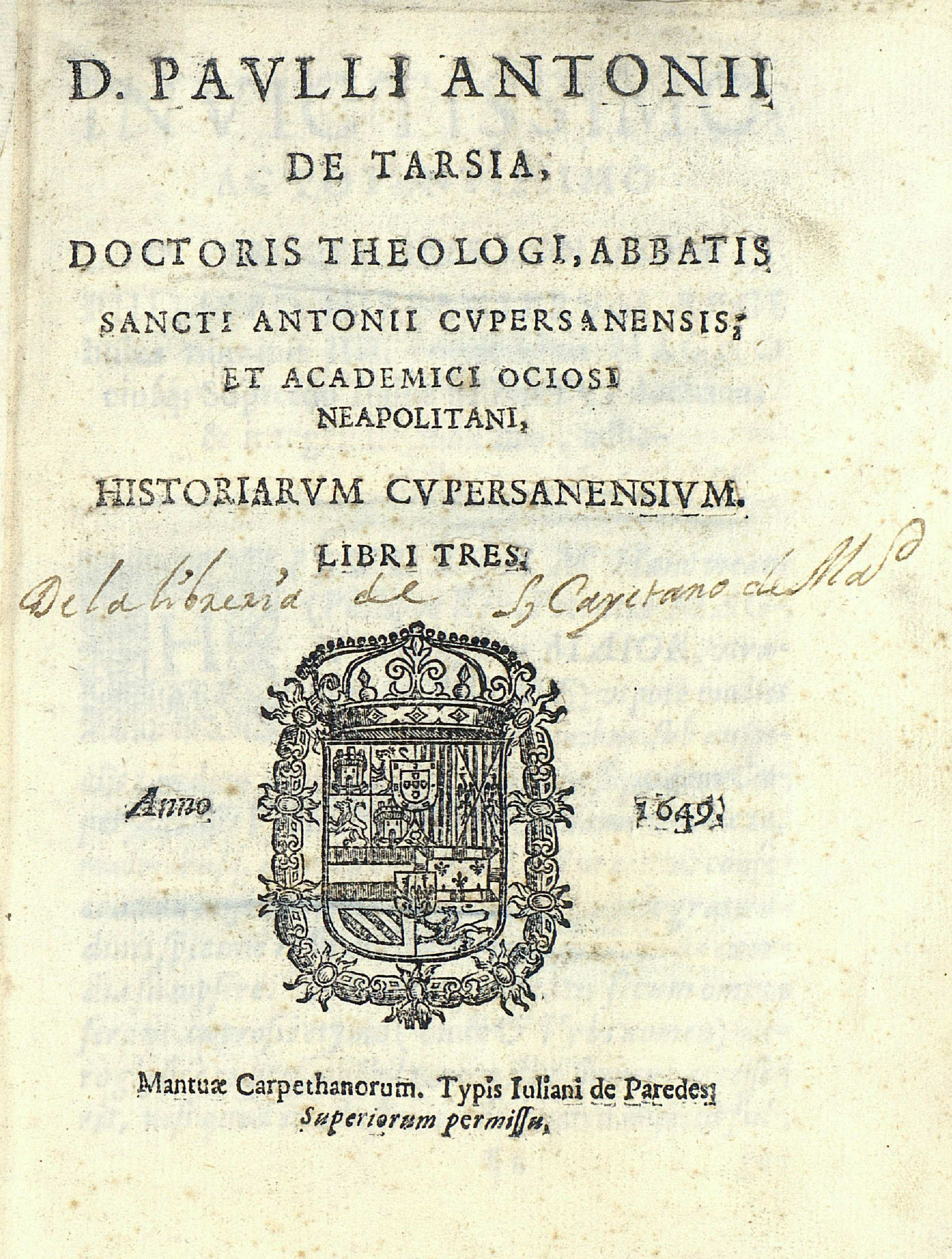 Paolo Antonio de Tarsia, portada de Historiarium Cupersanensium. Libri tres, Mantua Carpethanorum [Madrid], 1649, typis Iuliani de Paredes. Biblioteca Nacional de España.